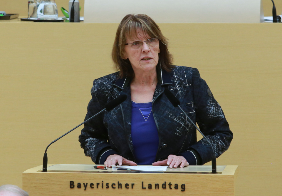 Kathi Petersen, deutsche Politikerin (SPD) und Abgeordnete im Bayerischen Landtag. Hier am 24. Januar 2017 während der aktuellen Stunde zum Thema "Mobilisierung der Demokratie: Politische Bildung stärken!"